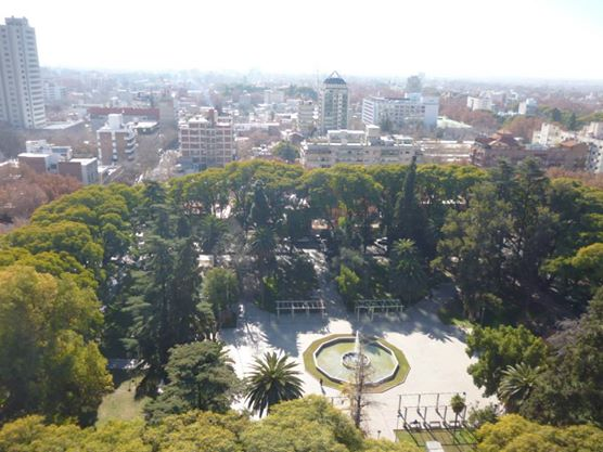 Panorámica de Plaza España y Mendoza Capital